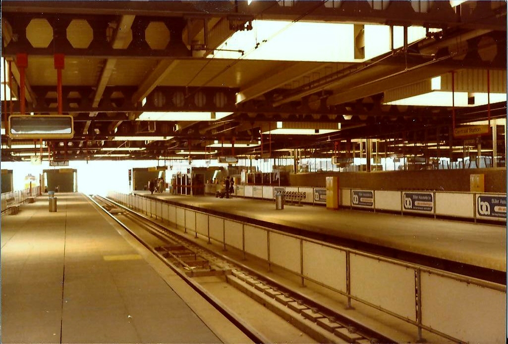 De tramplatform voor alle Ranstadrail werkzaamheden en tramtunnel. De tramkeerlus is dan nog in gebruik. Alle perrons worden maar door één spoor gebruikt, daar alle trams enkelrichtingtrams waren. Den Haag